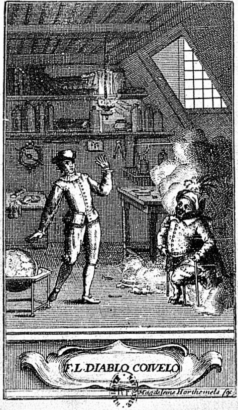 Frontispicio de Le Diable boiteux (Diablo cojuelo) de Alain-René Lesage, Paris : Veuve Barbin, 1707. Grabado de Louise-Madeleine Cochin. Bibliothèque nationale de France